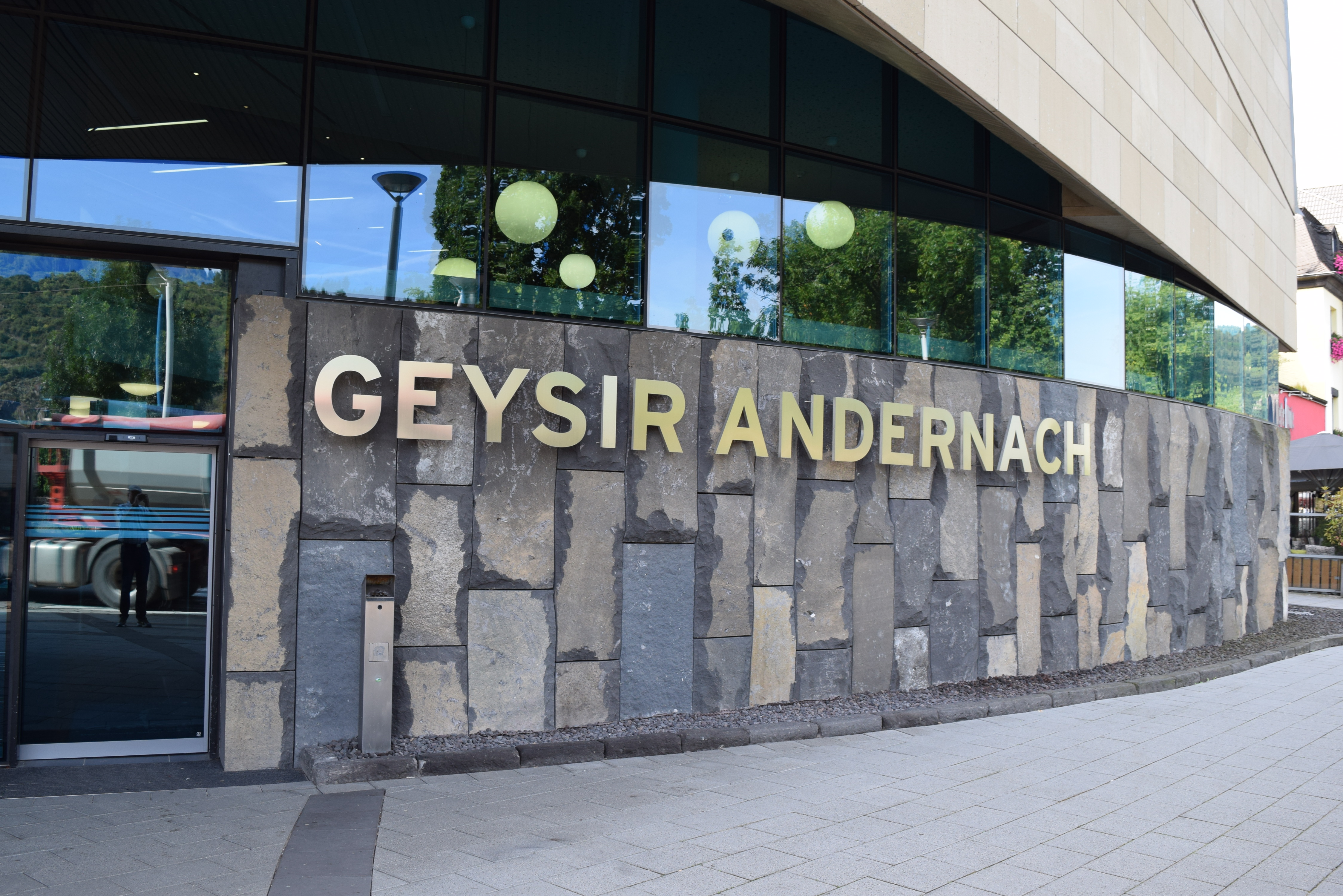 Geysir-Erlebniszentrum Andernach (Eingang)